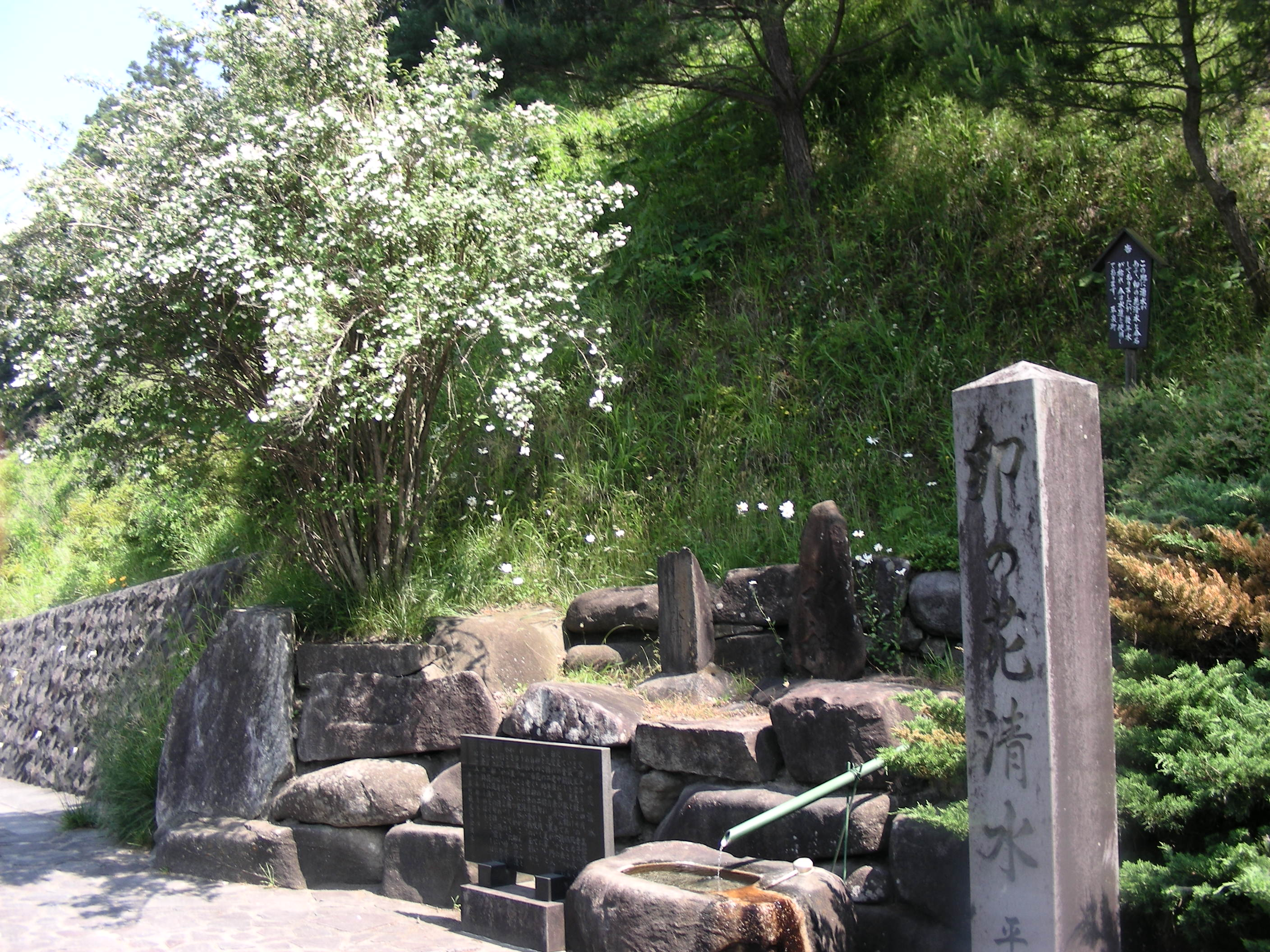 岩手県平泉町高舘義経堂に上る山道の麓にある卯の花清水の碑と卯の花。2008年6月9日撮影